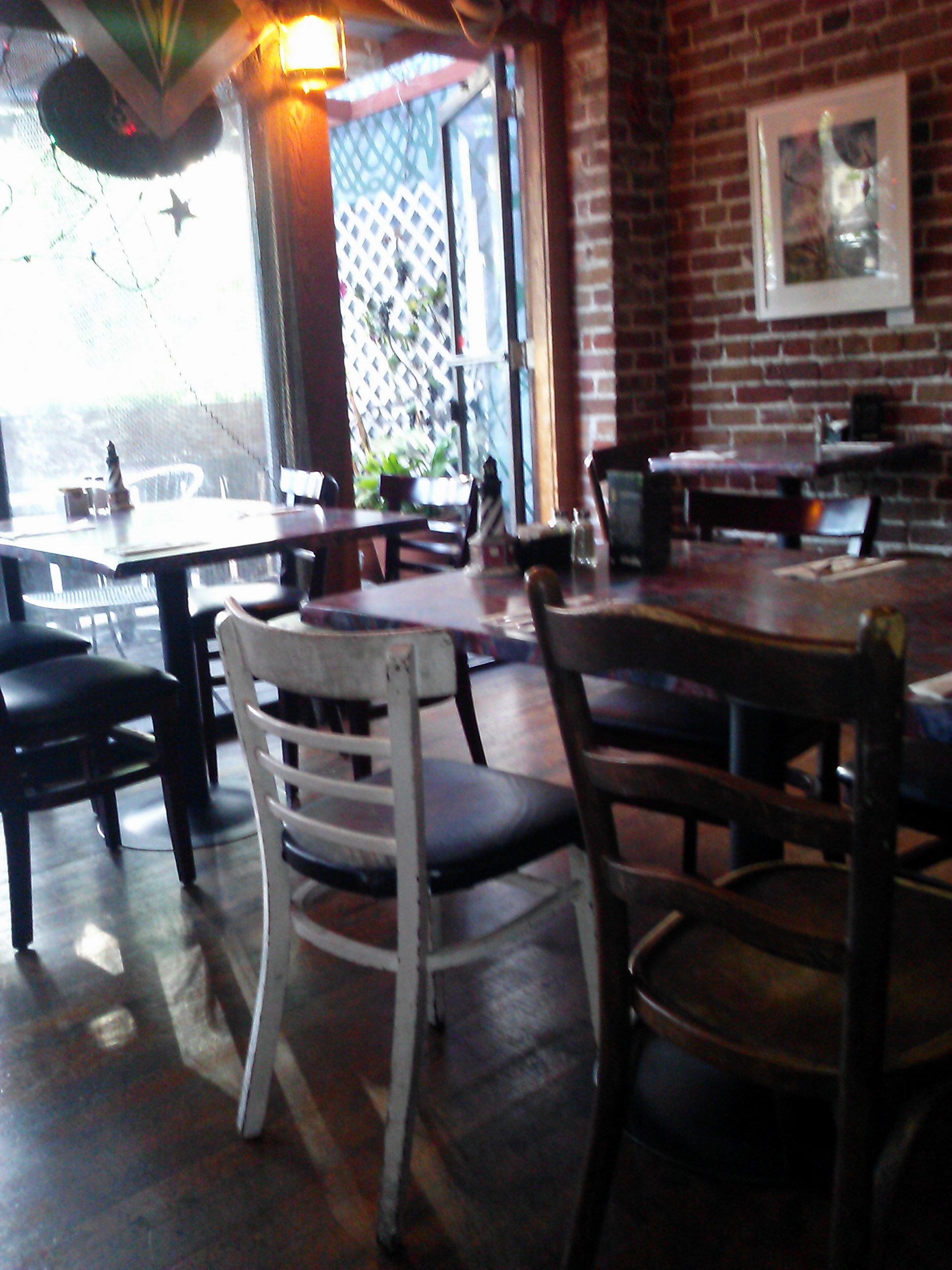 Main entrance